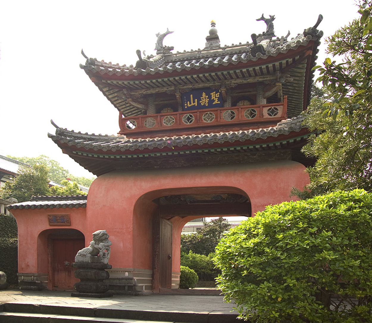 Sanmon 三門 (Romon 楼門) at Sōfuku-ji in Nagasaki, Japan. Important cultural asset (重要文化財)